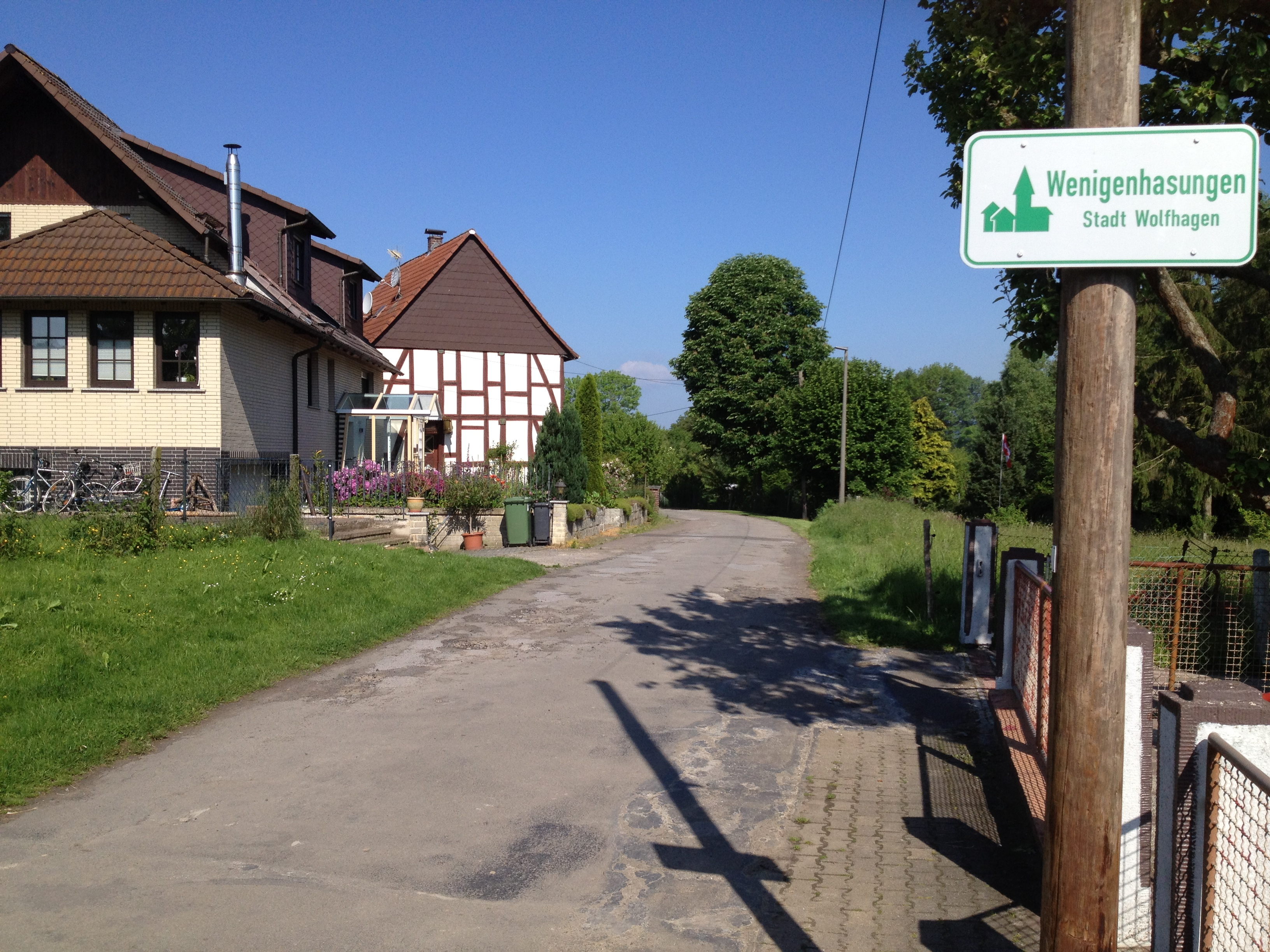 Lange Straße Wenigenhasungen; Kassel-Edersee-Radweg; Hess. Radfernweg 4.